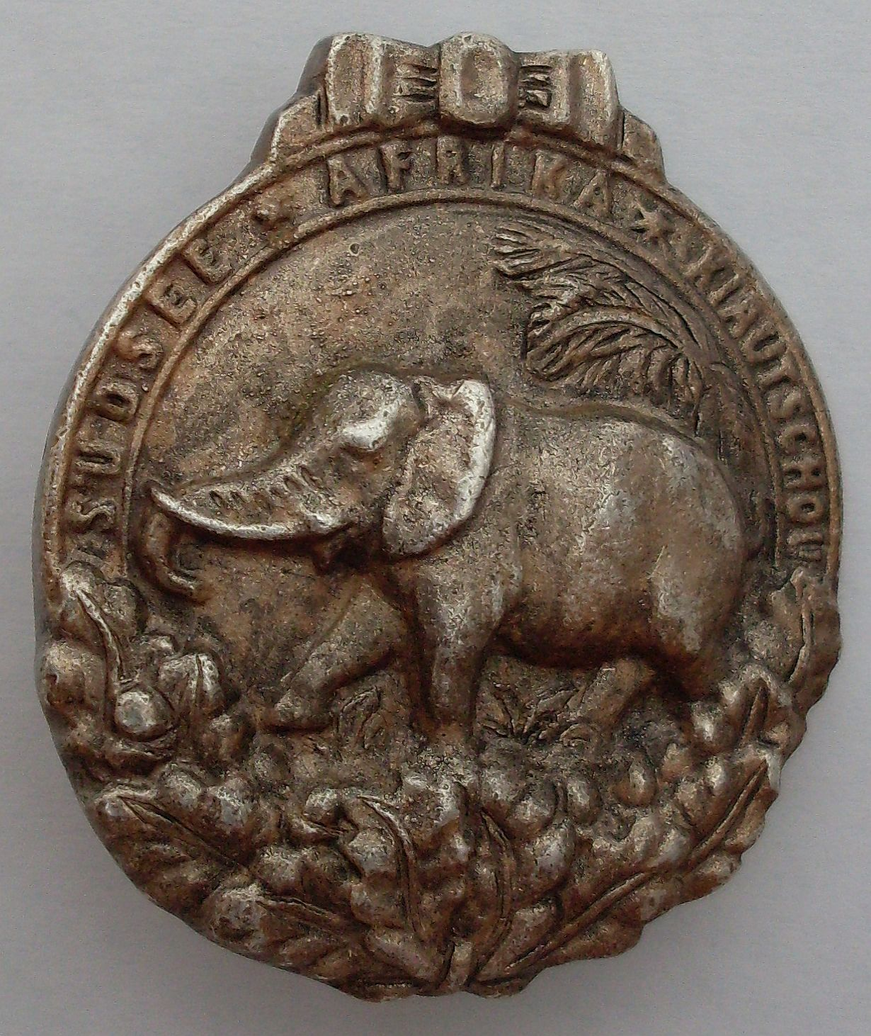 Kolonialabzeichen, umgangssprachlich auch Elefantenorden genannt. Umschrift: SÜDSEE • AFRIKA • KIAUTSCHOU